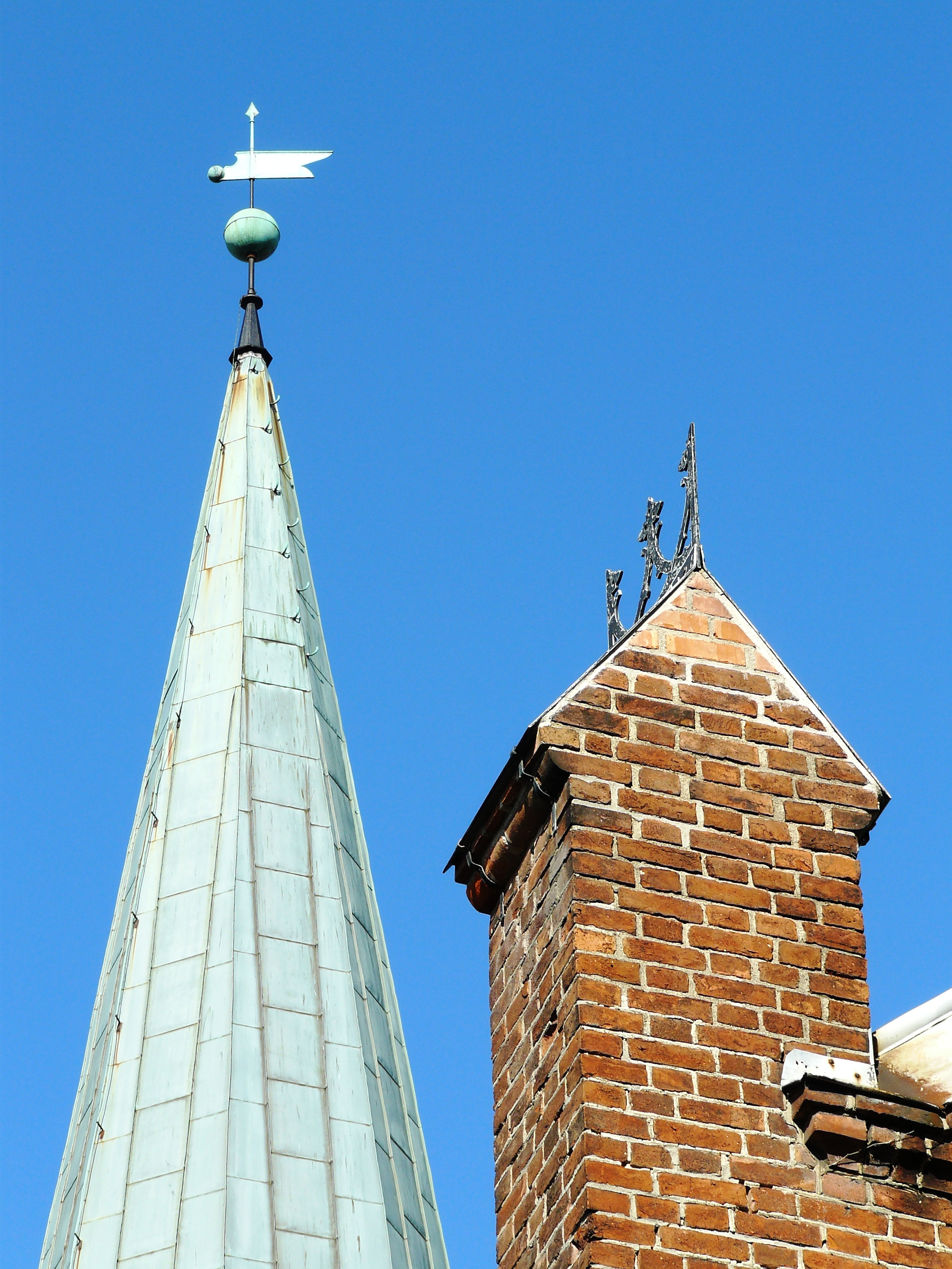 Kampen church, Oslo - churchspire and detail